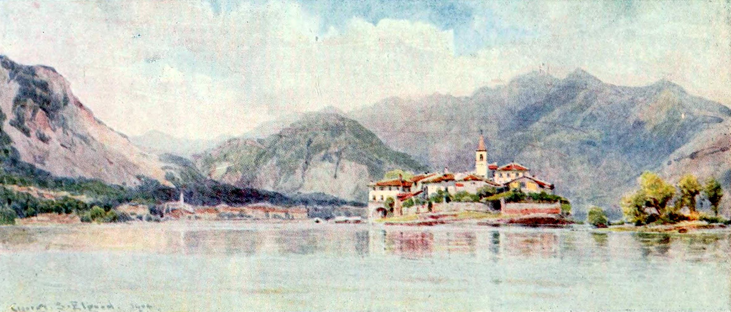 Lake Maggiore